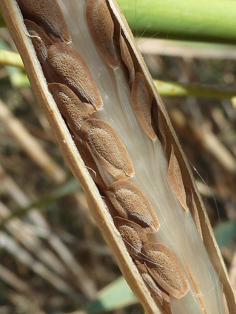 Cynanchum acutum (Matacán): Fruto maduro, con semillas - La Huerta/Camino de la Azarbe de Patricio - Albatera (Alicante, España).